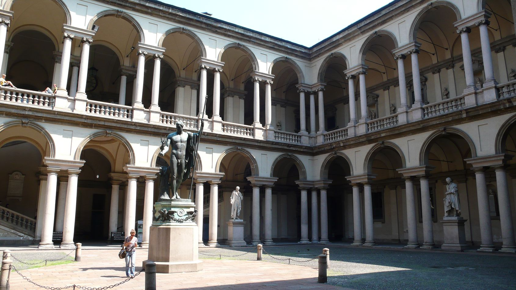 Pinacoteca di Brera, Milano, Innenhof